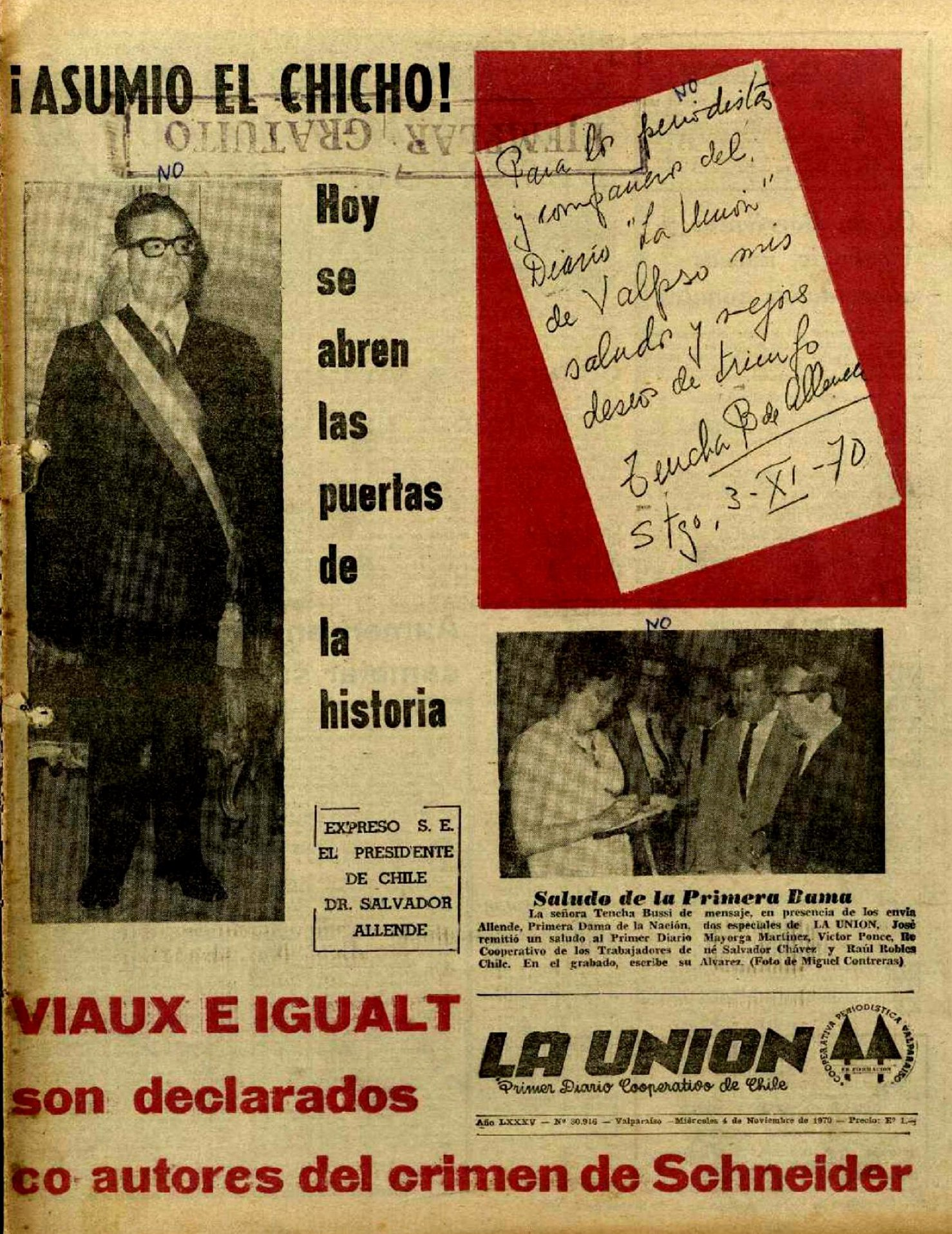 La Unión de Valparaíso, 4 de noviembre de 1970